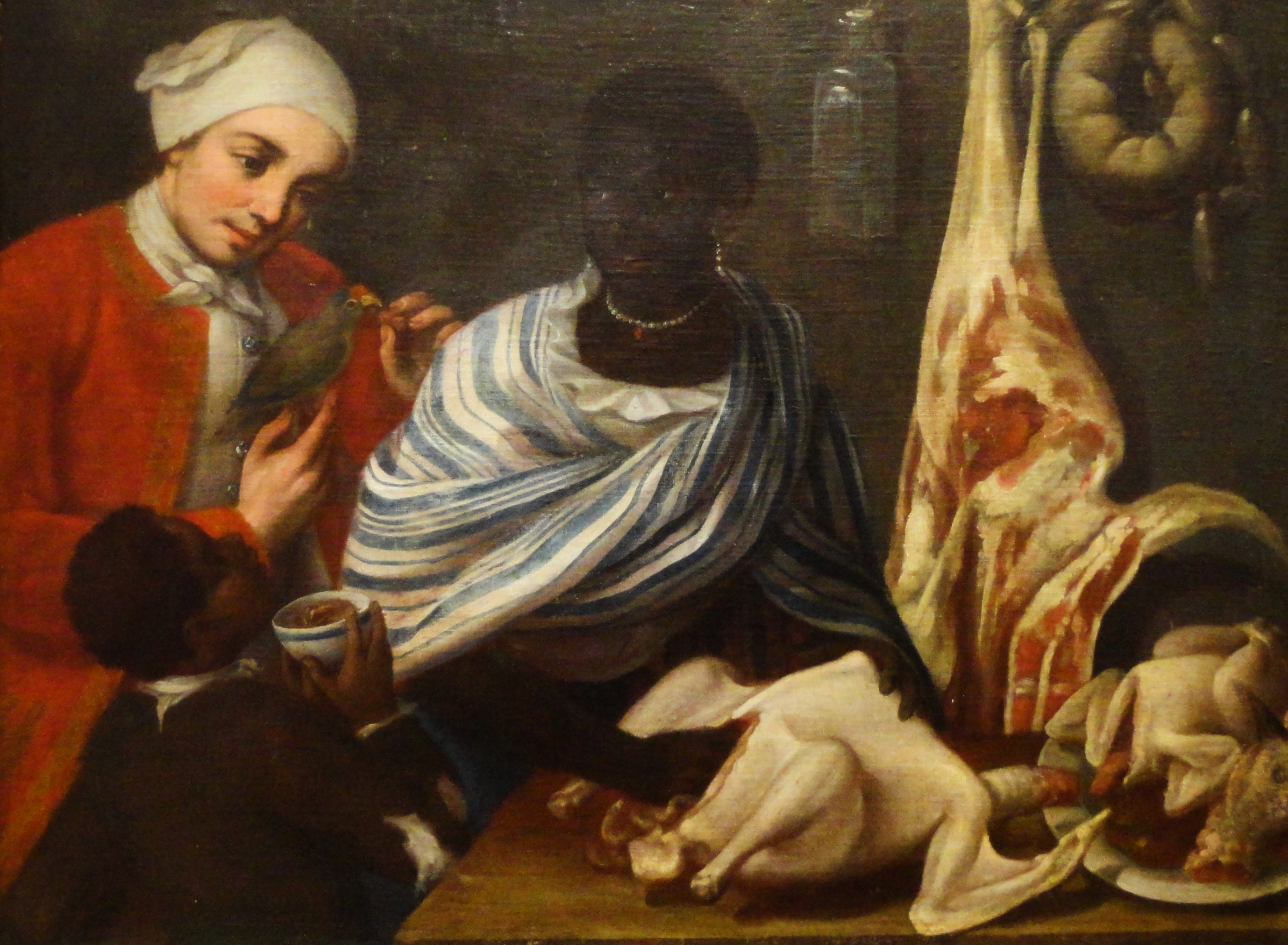 Casta - de Negra y Español sale Mulato, s. XVIII - Anónimo